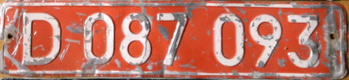 Дипломатический автомобильный номер СССР образца 1980 года